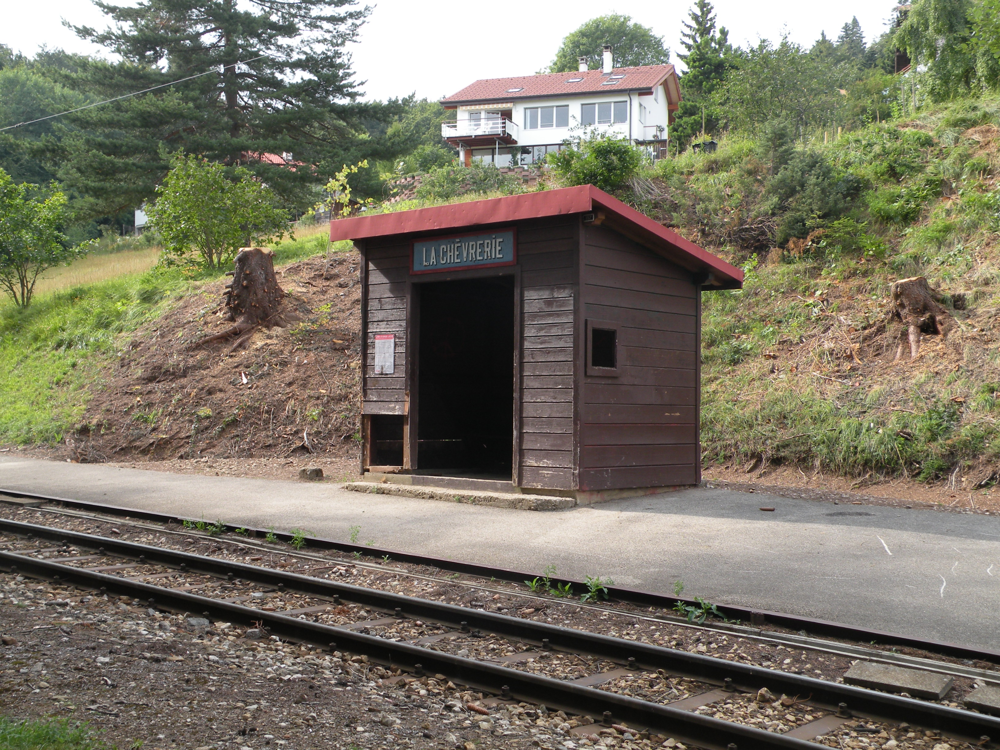 Gare de La Chèvrerie à Arzier.